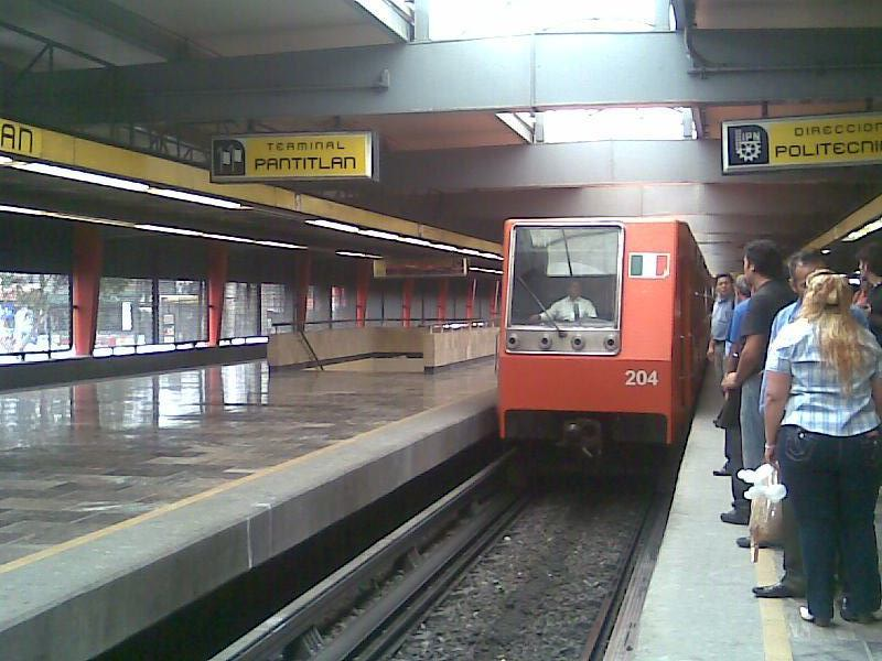 Concarril NM-79 del Metro de la Ciudad de México.